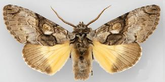 Charadra tapa male